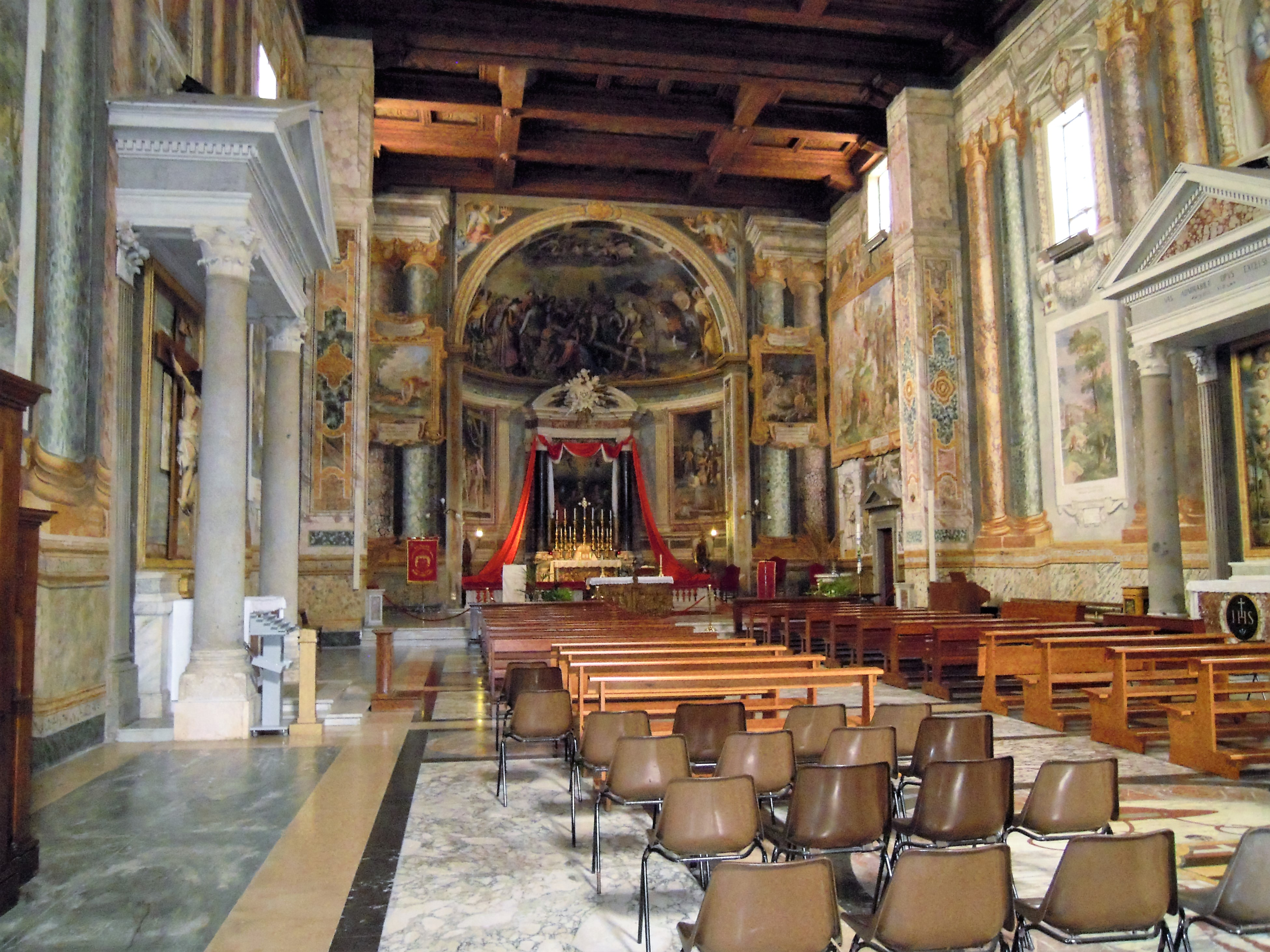 Roma, interno della basilica di San Vitale